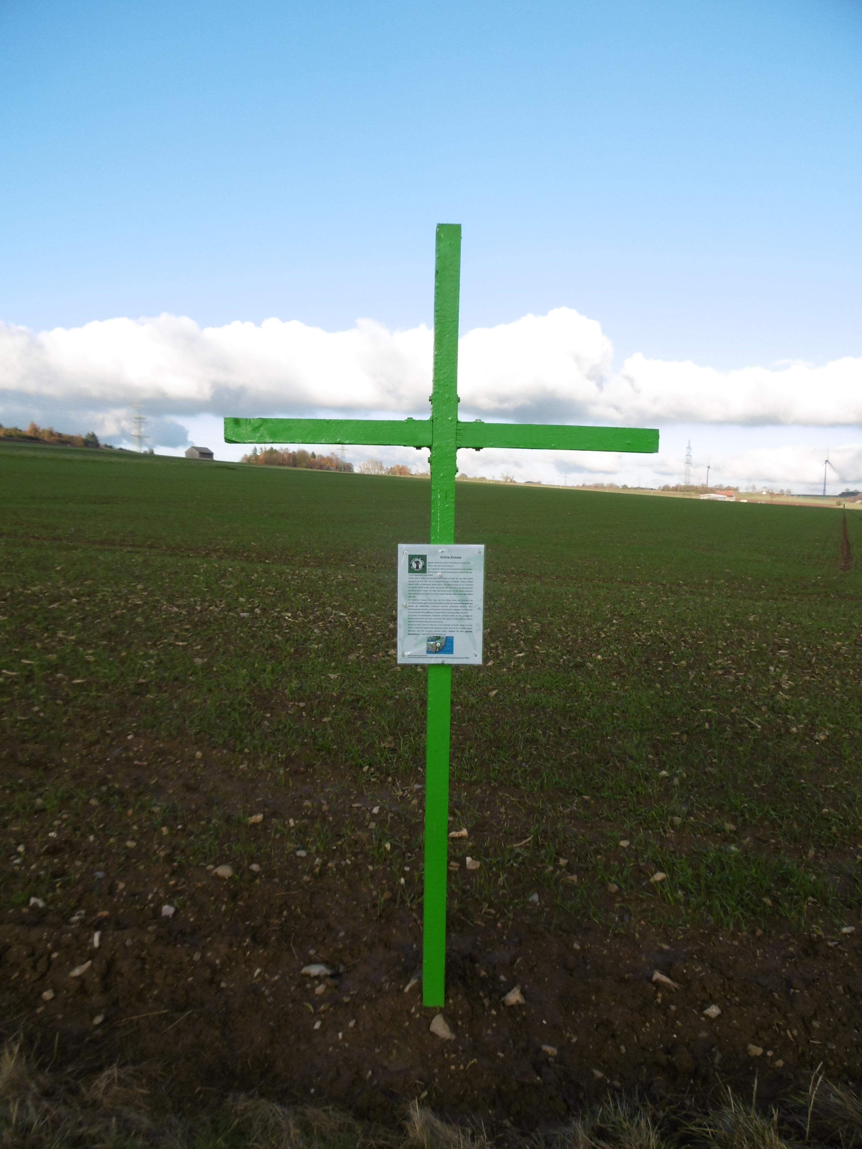 Kreuz der Aktion Grüne Kreuze im Landschaftsschutzgebiet Wintertal-Escherfeld nördlich Brilon (Sauerland, NRW).